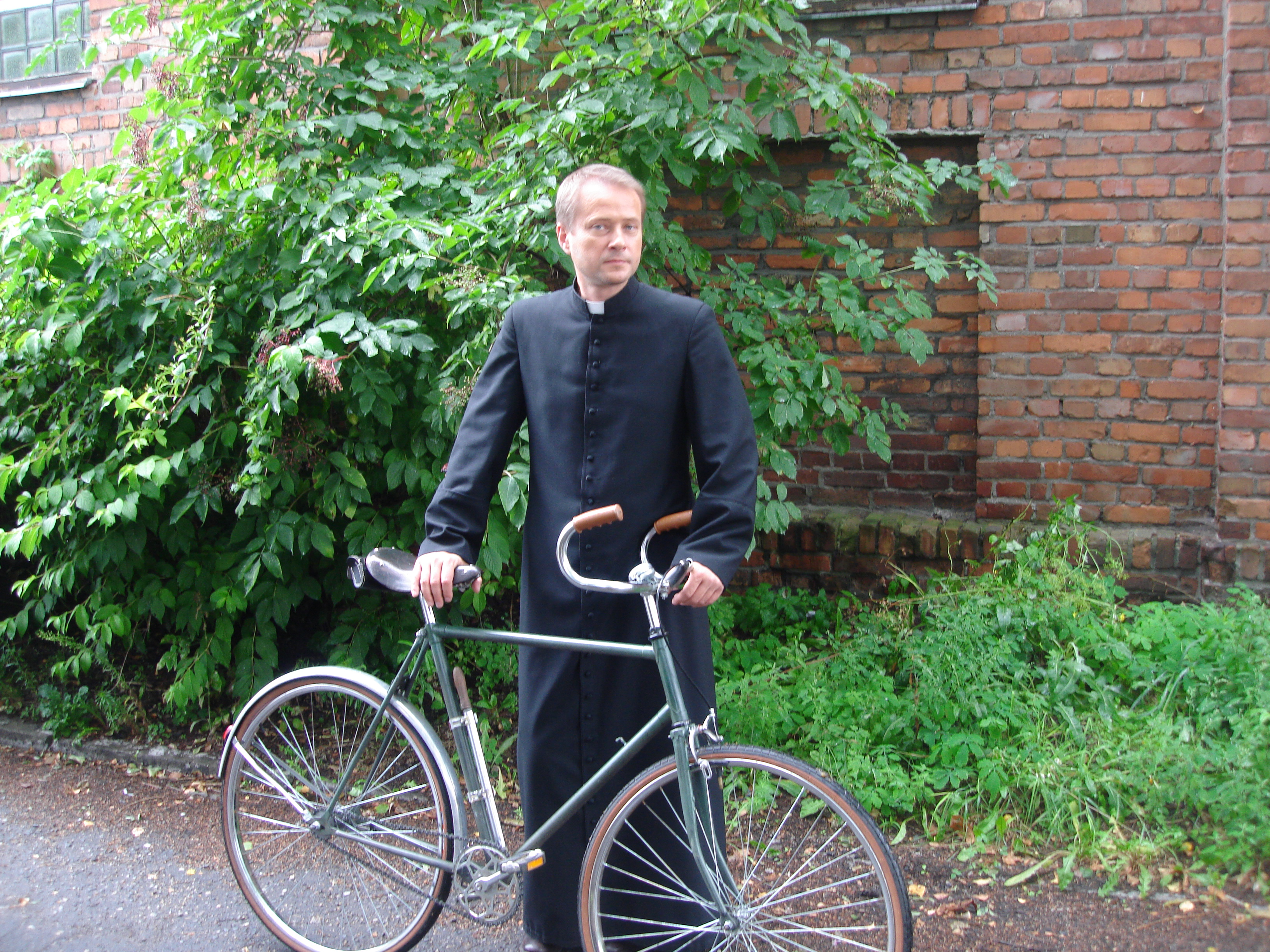 Ojciec Mateusz z nieodłącznym rowerem